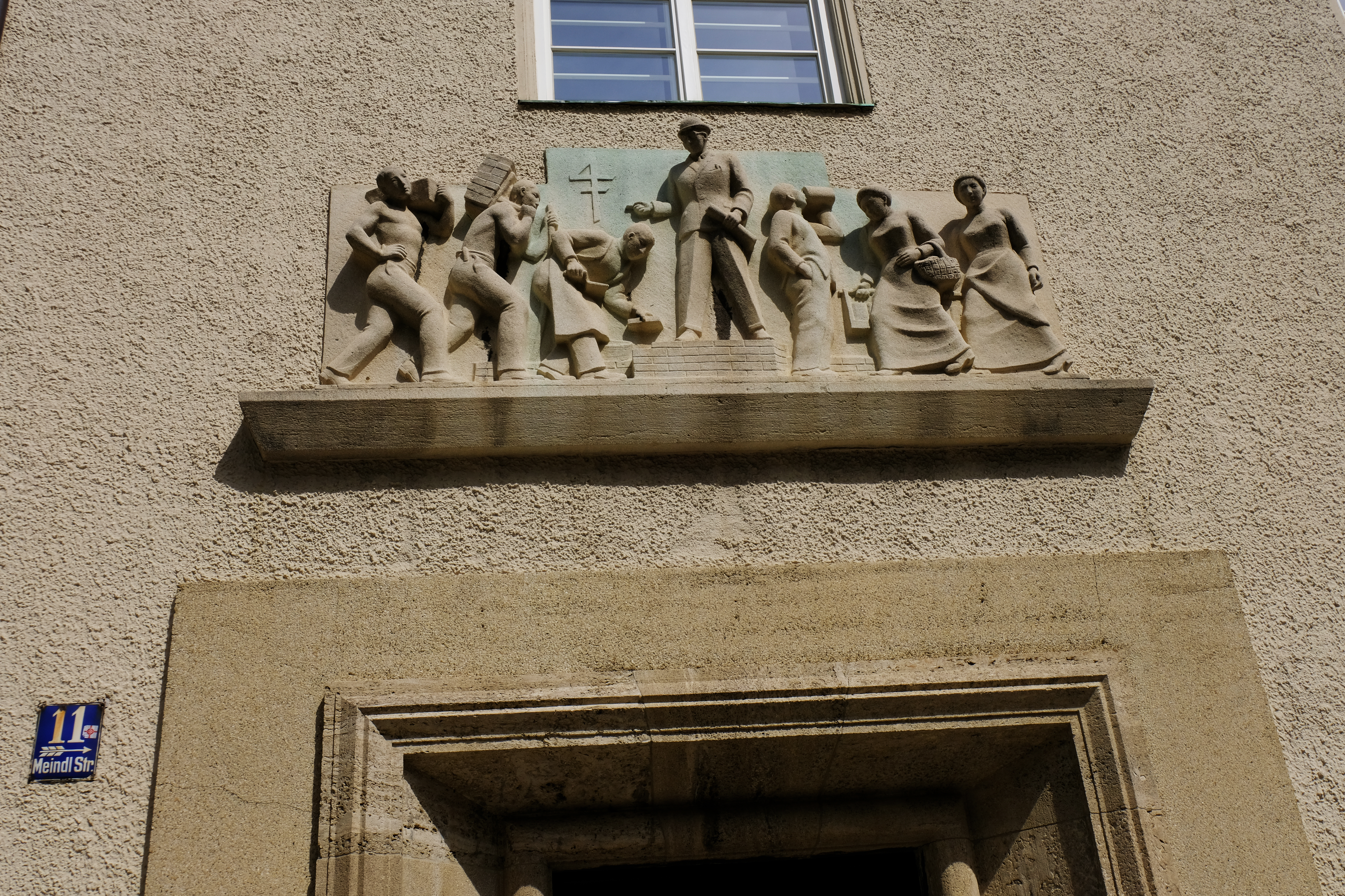 Gebäude an der Meindlstraße 11, erbaut um 1927 nach den Entwürfen von Otho Orlando Kurz und Eduard Herbert